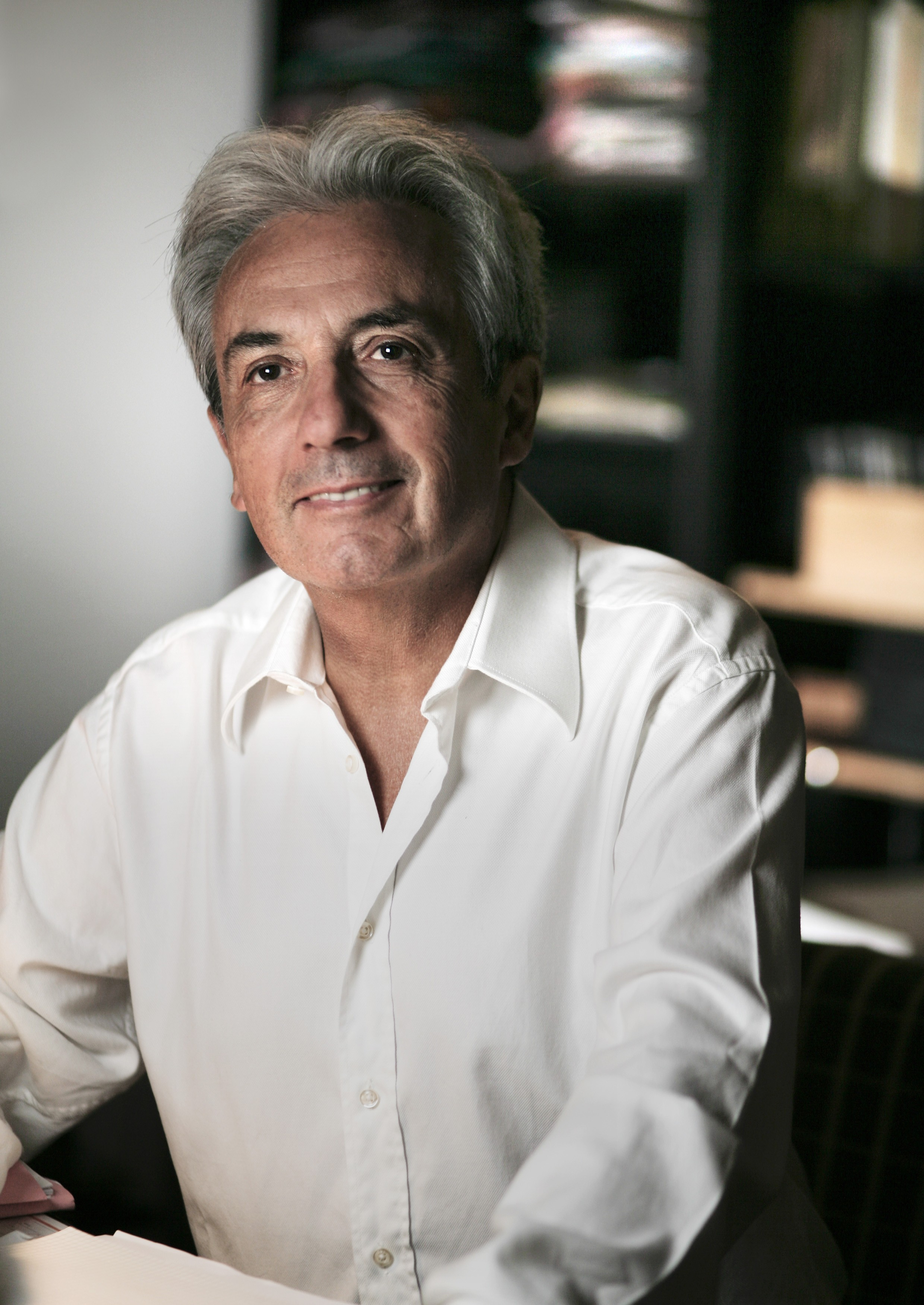 Portrait d'Albert Fert